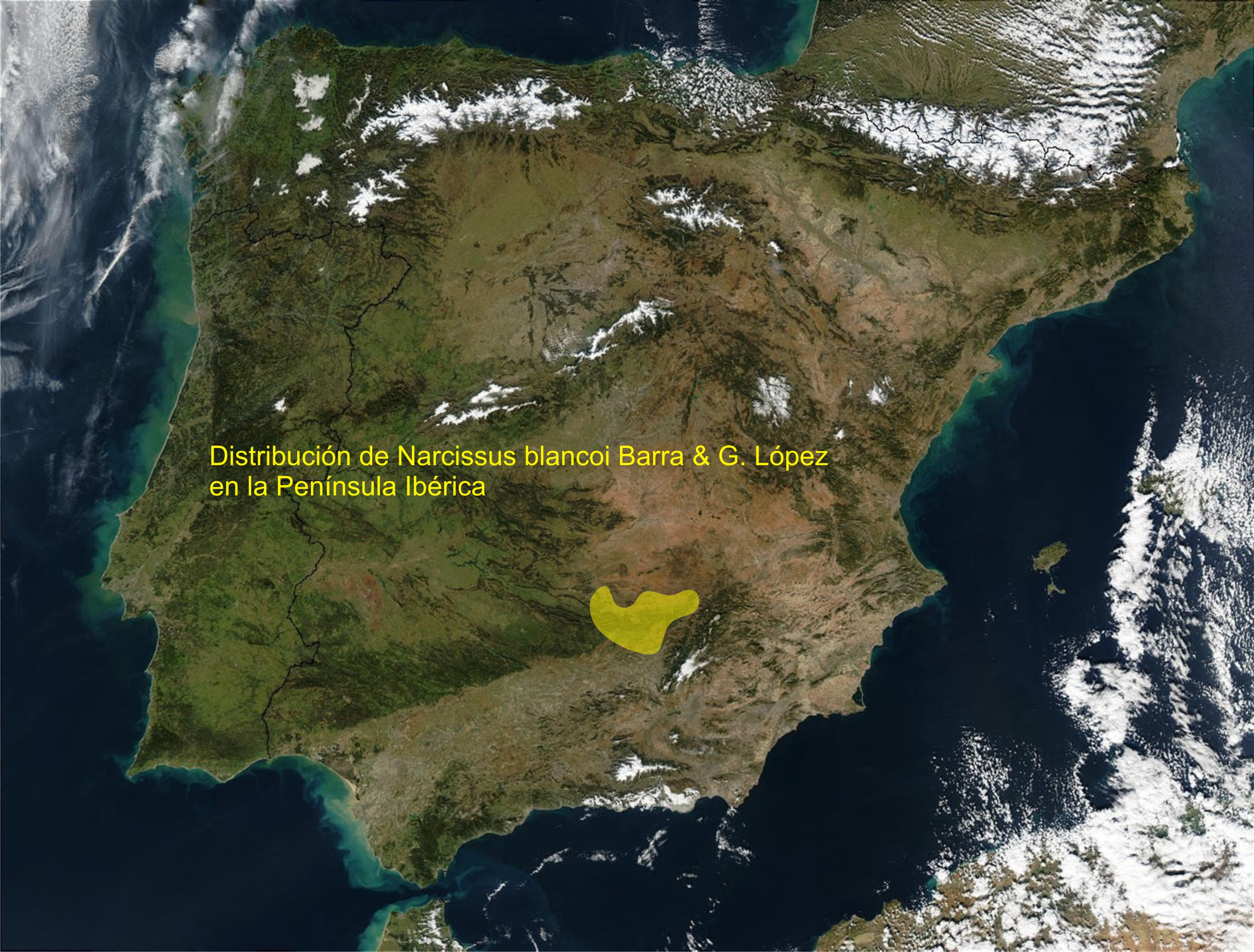 Área de distribución de Narcissus blancoi Barra & G. López en la Península Ibérica.